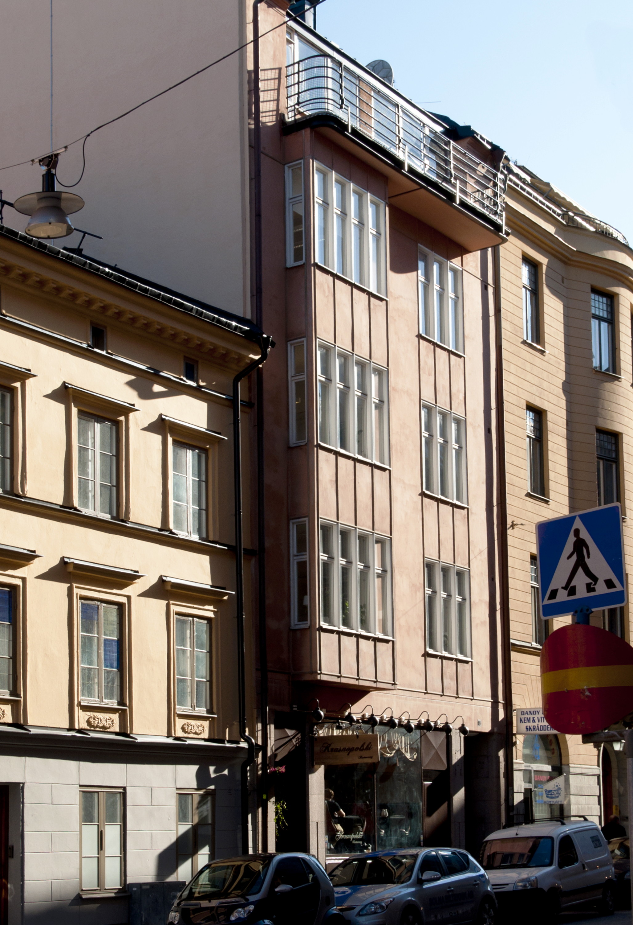 Italien Större 8, Regeringsgatan 88, Byggnadsår 1905-07, arkitekt och byggherre Georg A. Nilsson, byggmästare Ivar Nyqvist.